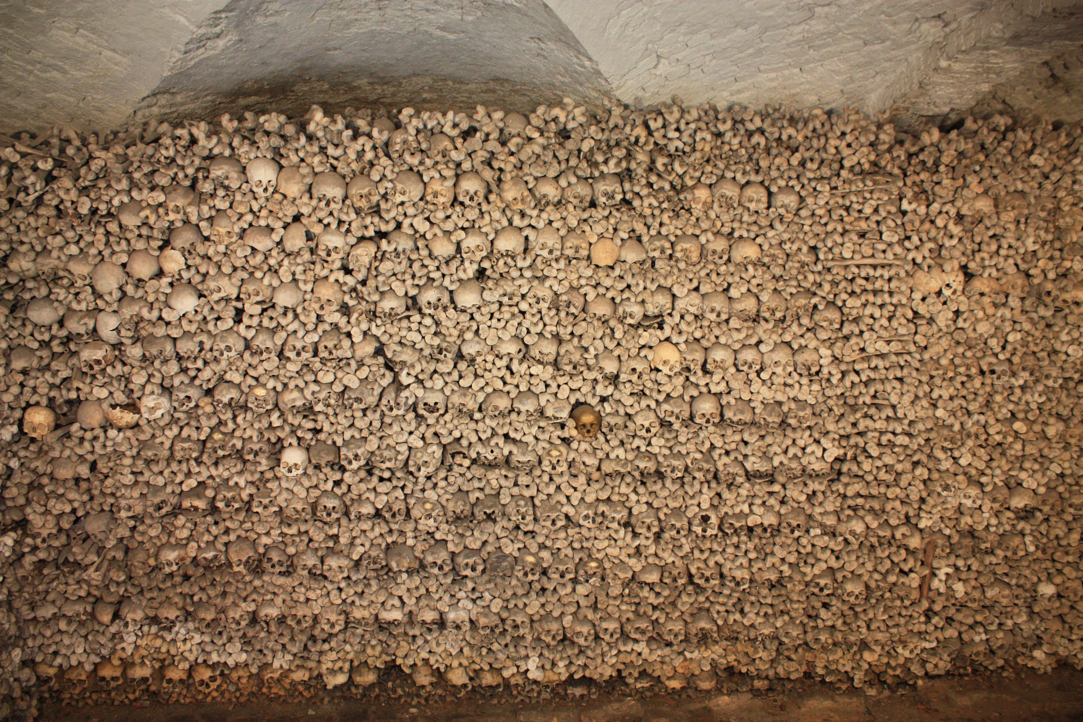 Michaelskapelle Oppenheim (Beinhaus), Gebeine mit "König" (vergoldet)